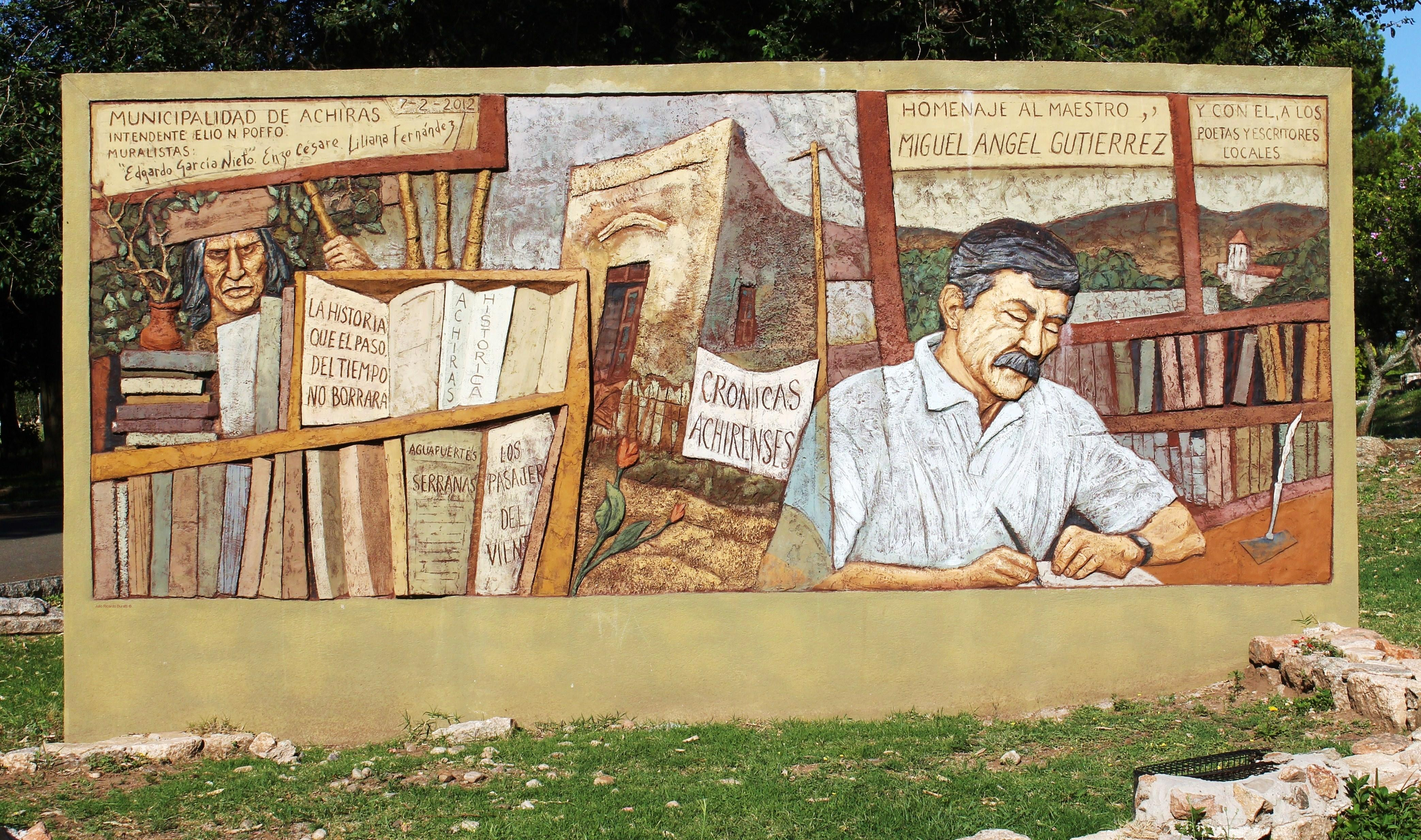 Mural homenaje al maestro y escritor Miguel Angel Gutierrez en la localidad de Achiras, Córdoba, Argentina.